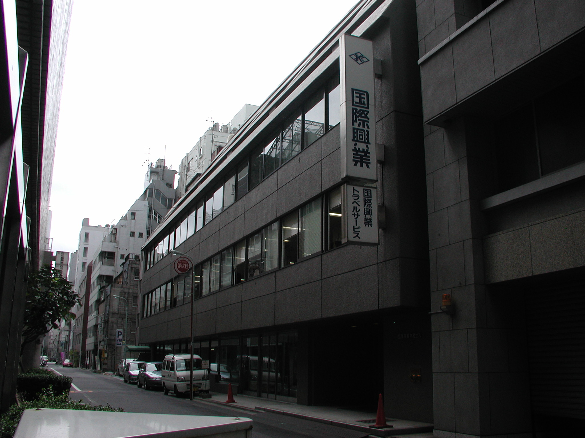 国際興業 本社